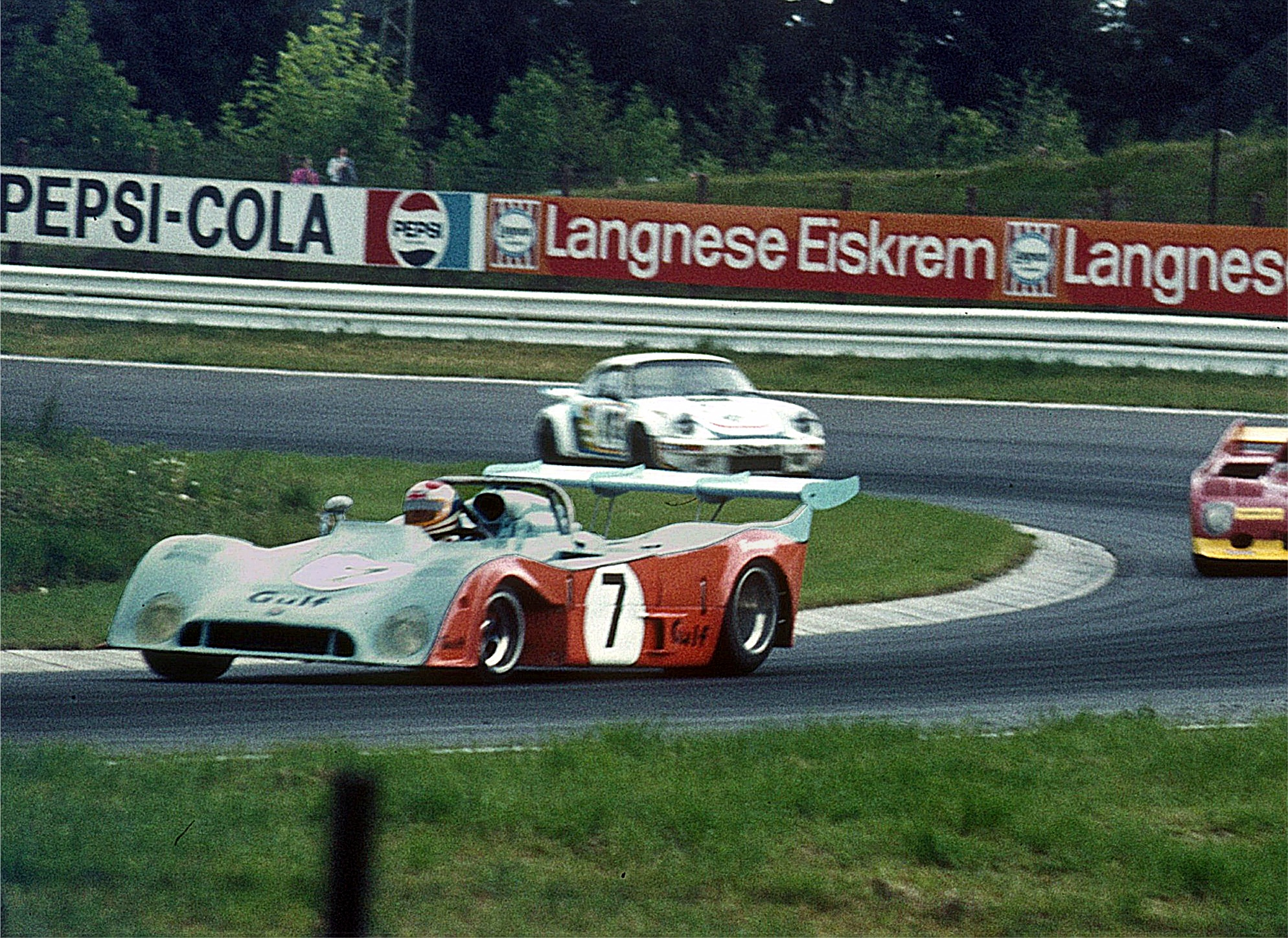 Gulf GR7 (Fahrer Derek Bell oder Mike Hailwood)